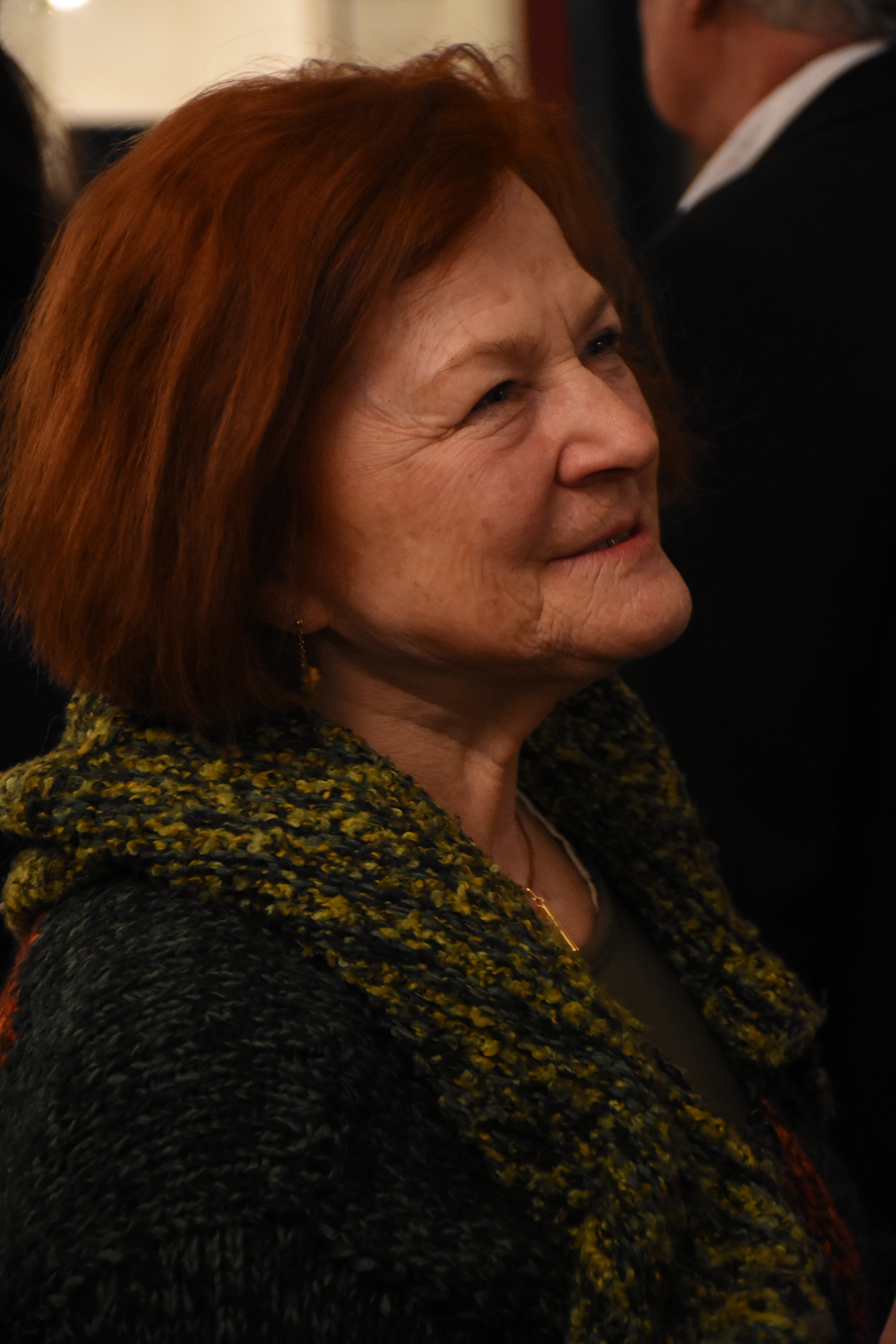 Setkání signatářů k 40. výročí Charty 77, Palác Lucerna, Praha, 7. ledna 2017Helena Klímová